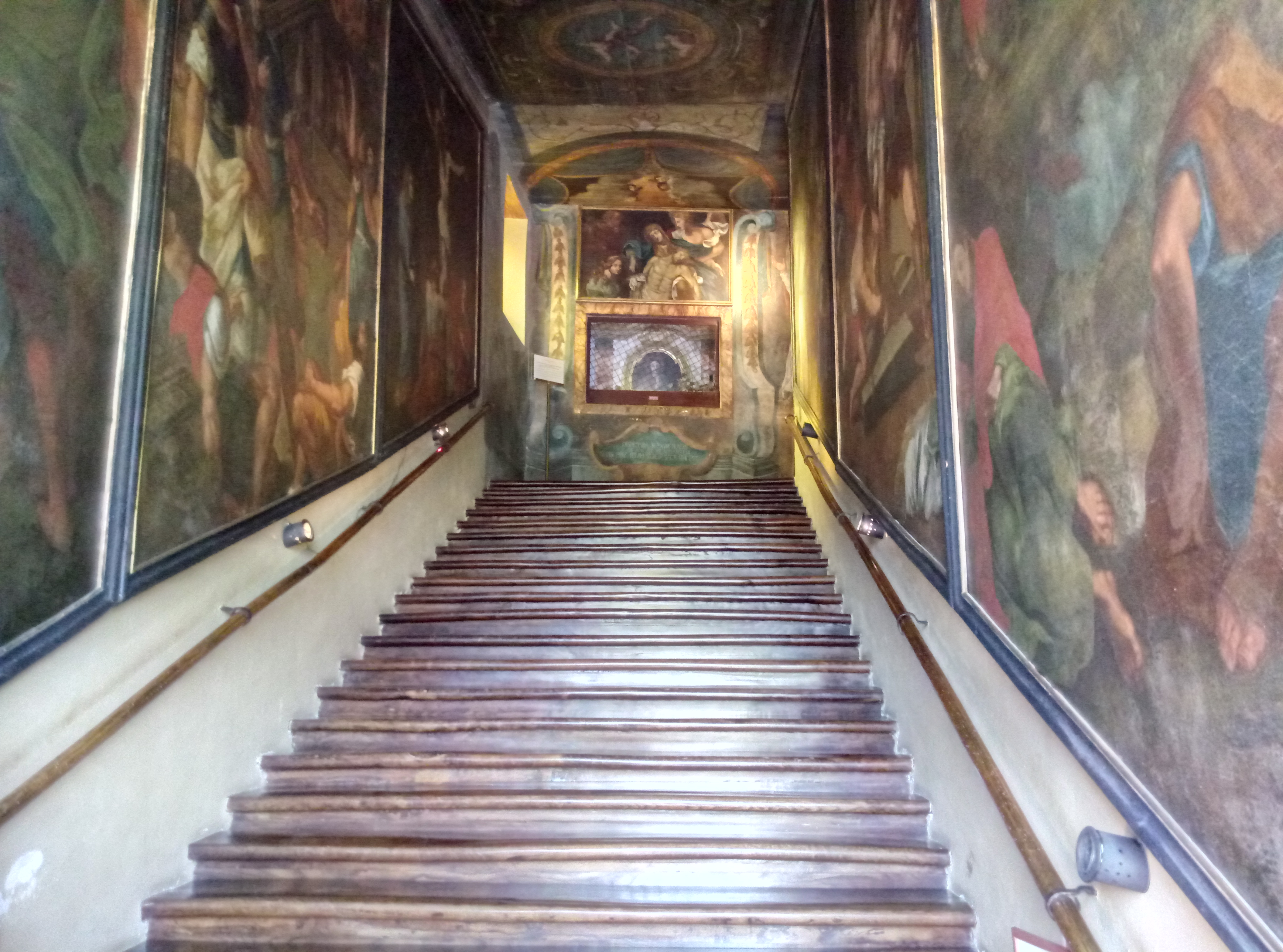 Wer auf Knien die Treppe betend erklimmt, dem werden alle Sünden vergeben